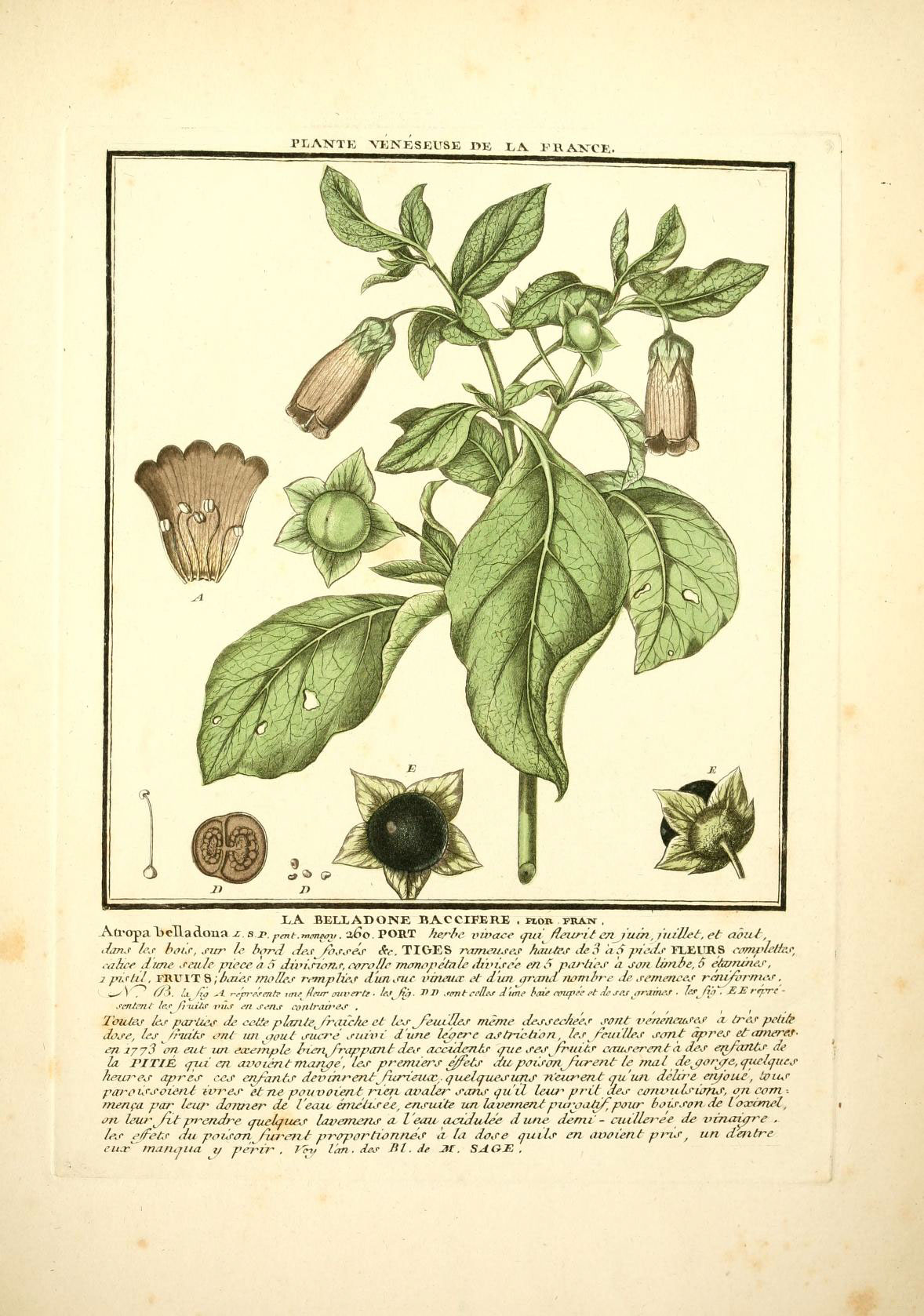 PLAyrTE VKNKSKU8E r.E LA. FKATSTCE. XA BELLADONE BACCIFERE . non fRAn , Ab'opa'beTladoua z. a T.j.mt.^rimMv. -1.60. fort herh^ i-.ivace fut ffintri t en l'utn , iiiiUet, et aôn/-, Jjn.f /.',!• hiit'.c , ,cirr h hmî ,jkf /(V.r.w c^c, TIGES nurui/JAf A«/^.i- ./^ .^ ./ .-f ^ v.»/.r FLEIIR S CLVnplfttcf^ rattcf Jifrn ,rcu/e pièce a 5 dû'ùruyn.i; eeroUe mirn.-.péinle ili'in.re'e en S parités n jori Uinhe, â etiortùiej' , 1 pùtlil , TKV\T%;binej' molle..' r,tnplw iVialKmc l'àieitcT ef d'tm trnztid ji/ymhre Je .remenees r-miforntiV . i^S, Û?.. !.i /)j ^i r-f'/Tf/.'mtp tmf finir mn^ertr U\lijj. J. 11 .'mt cflleJ J'um haie nnrpA' ^t licsar .irame.' k.'flJi".£.ErryrC- TouAv /e.r pa/-iuv Je eelfe pim/e^/raieAe cir L\t- JèuiUe.r même dessee/ie'e,' .wit t'ene'neikW .i li'e.' pclik Jo^e, le^ /rtdiir iv// un iioul jttcre ^ruivi d'une lebere a.f tnc h'e n , le.r /-eui7/es sont âpres etcmierej- en 1773 \rn etit un etxei'hple hienjrappant Jes aecidents piie sesJ/ritUs eaturerent à des ertfarU^i- de ta riTIÉ qui en avûténtmarvpe, les premiet\.- e^ets dti peisûn^fiirent le mal de^tj.yr\i'e,qiiclijiies keia^es api^ès ces enfitnts dev.cn*^entfiirnettœ,qu£lquesuns n'ettr-ent iju'un Jelere en/eue, U.iw pat-eursoien/ iiu^es et ne pouvaient riat avalei~ san,c qu'il leAW prit des ceniuilsàrh^f, on com. -- mença par leio^ ileioter de l'eau éméti^fée, ensuite un laveinent pia\iiib/', pour boisson de loxcmel^ on leui\/xt pi~endre mielaues lavemens a l'eau aeriJulee d une demi - ciiillei^ee de xyrnaup'e . les e/Fets Jti potstm ruinent proportionnes a Li dose quils en avo t'en t pins , un daxtre 1-u.T tnan^jlia tl peiui^ . /??/ l'an . des Iil.de Jlt , SAOE